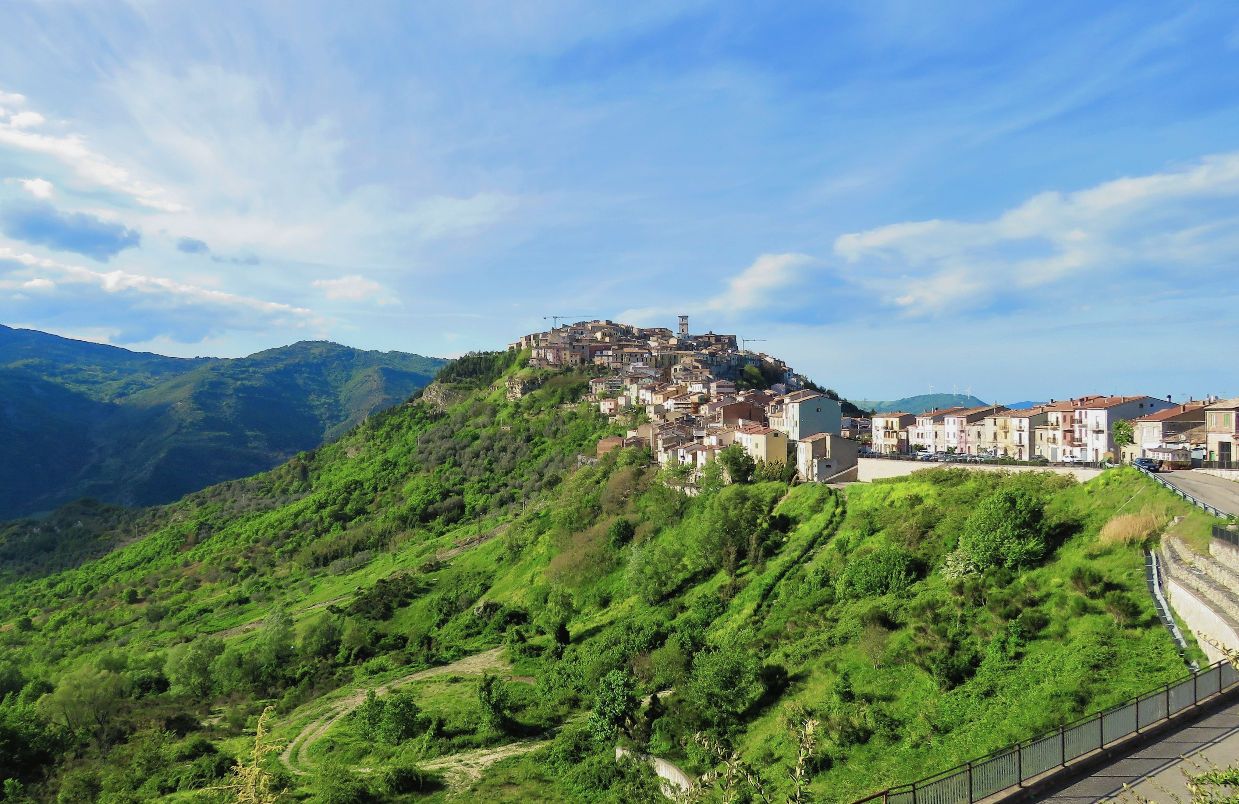 Panorama – Trivento